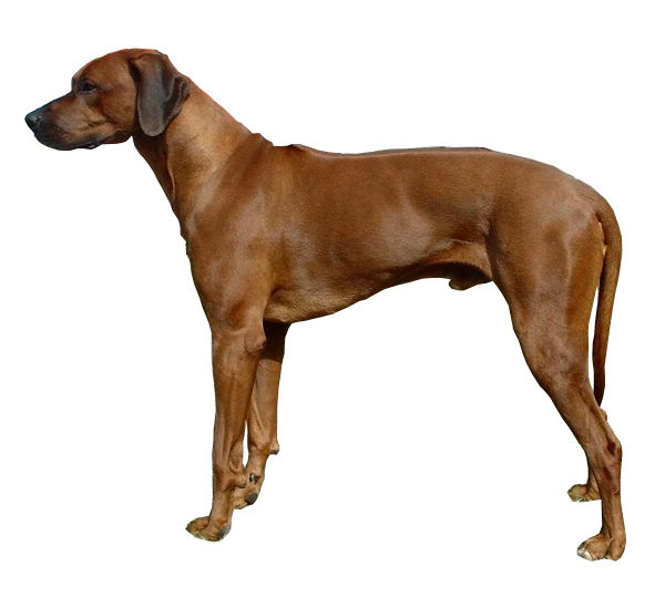 Chien de Rhodésie à crête dorsale sur fond blanc